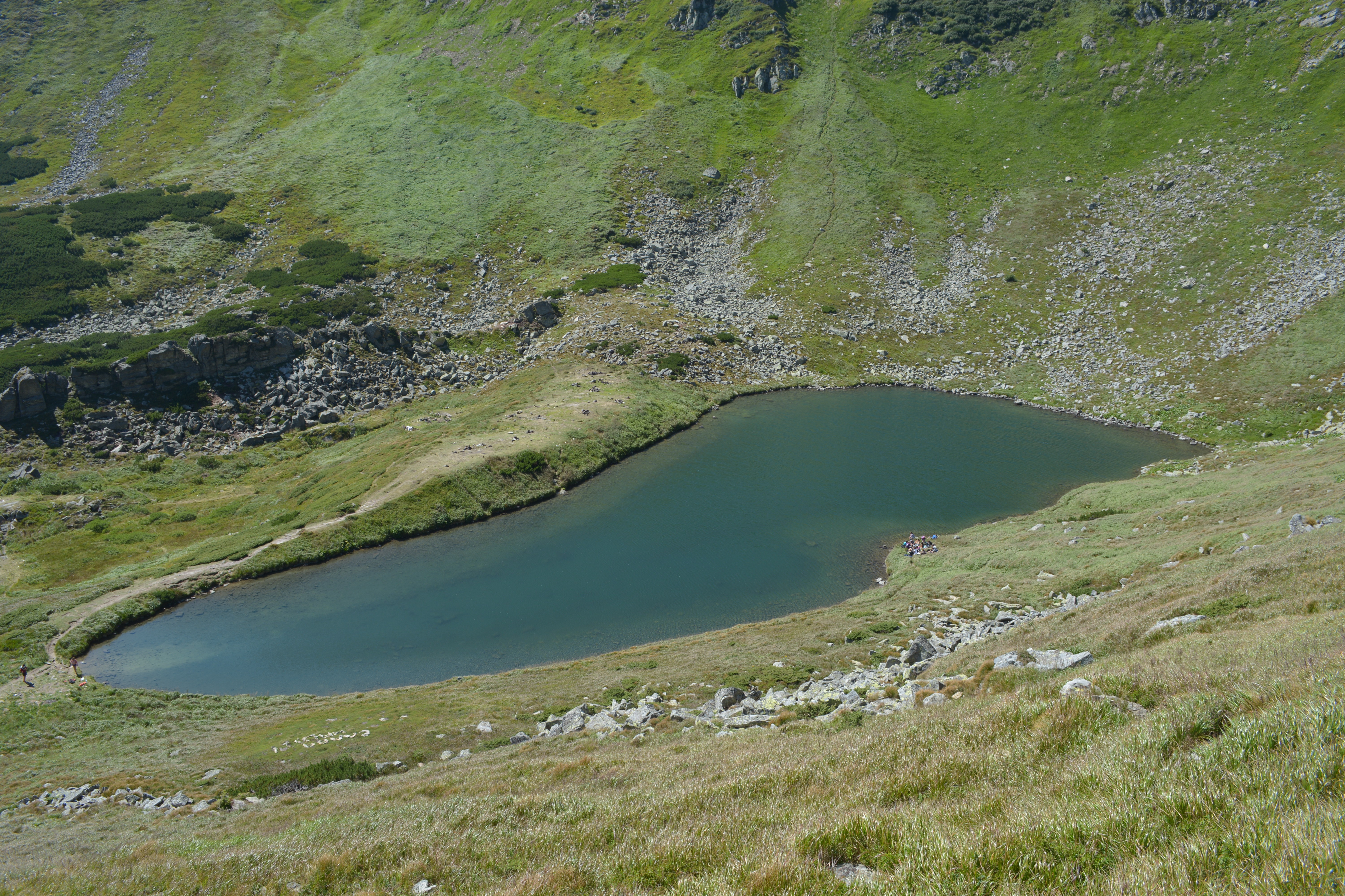 Бребенескул - вид зі сходу